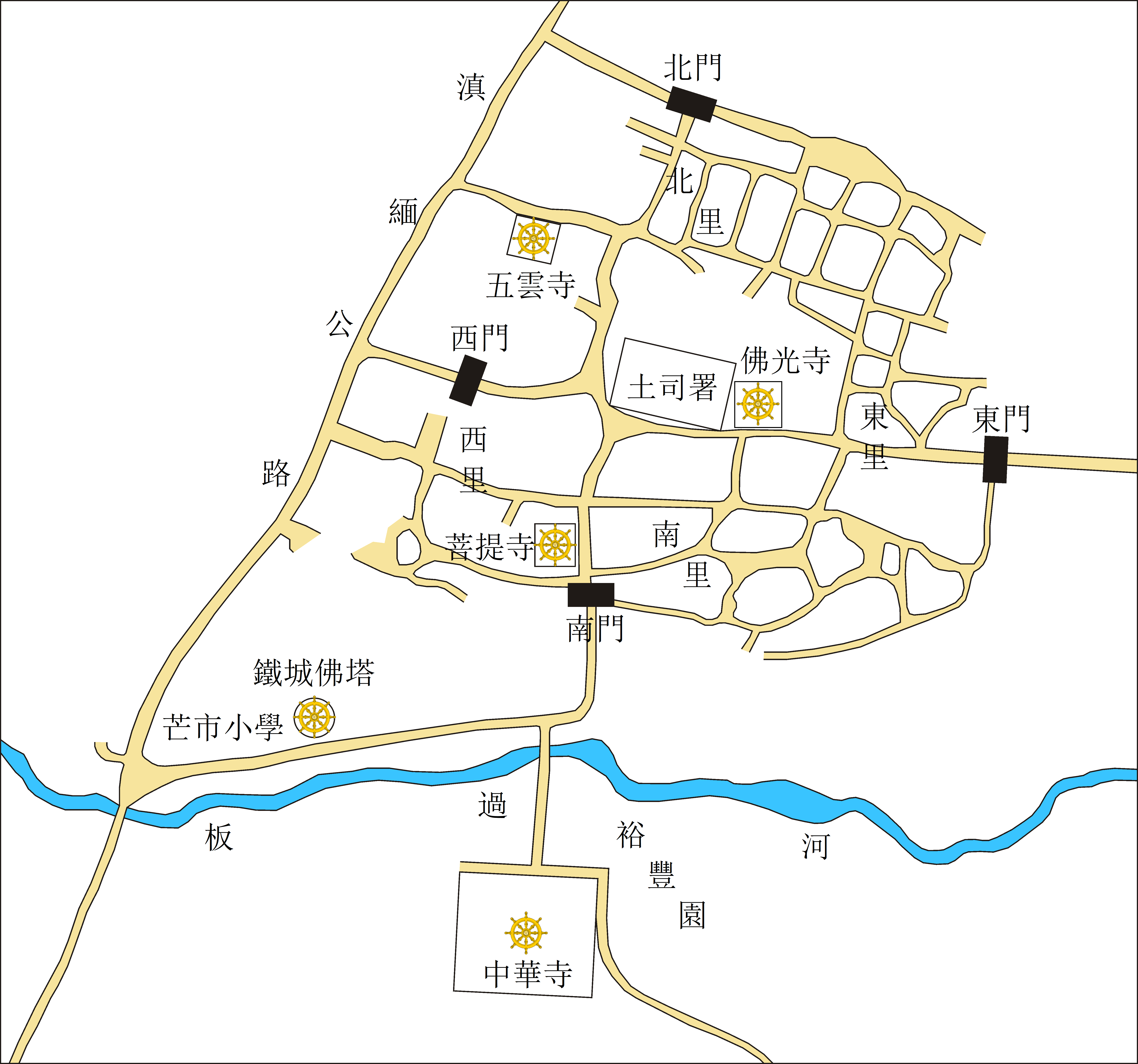 中文（中国大陆）: File:芒市城1950.png的繁体版